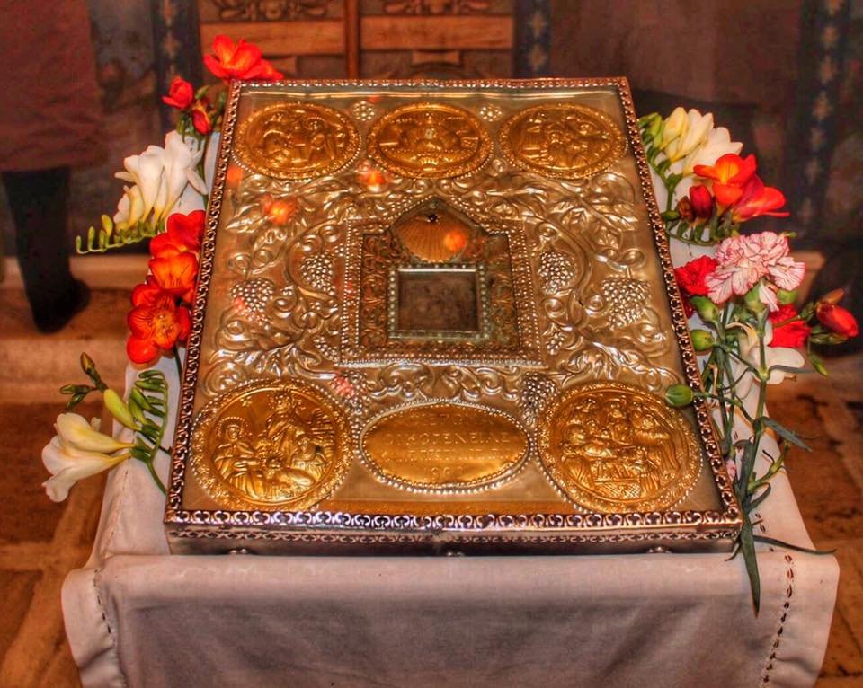 θ